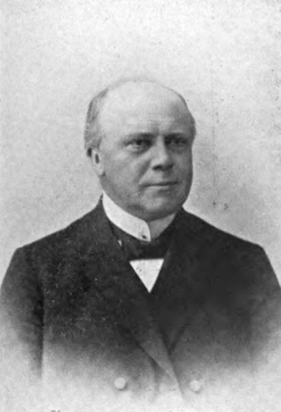 Hornjoserbsce: Měrćin Renč (1853–1911); farar, dr. phil., serbski stawizniski slědźer a kulturny prócowar.